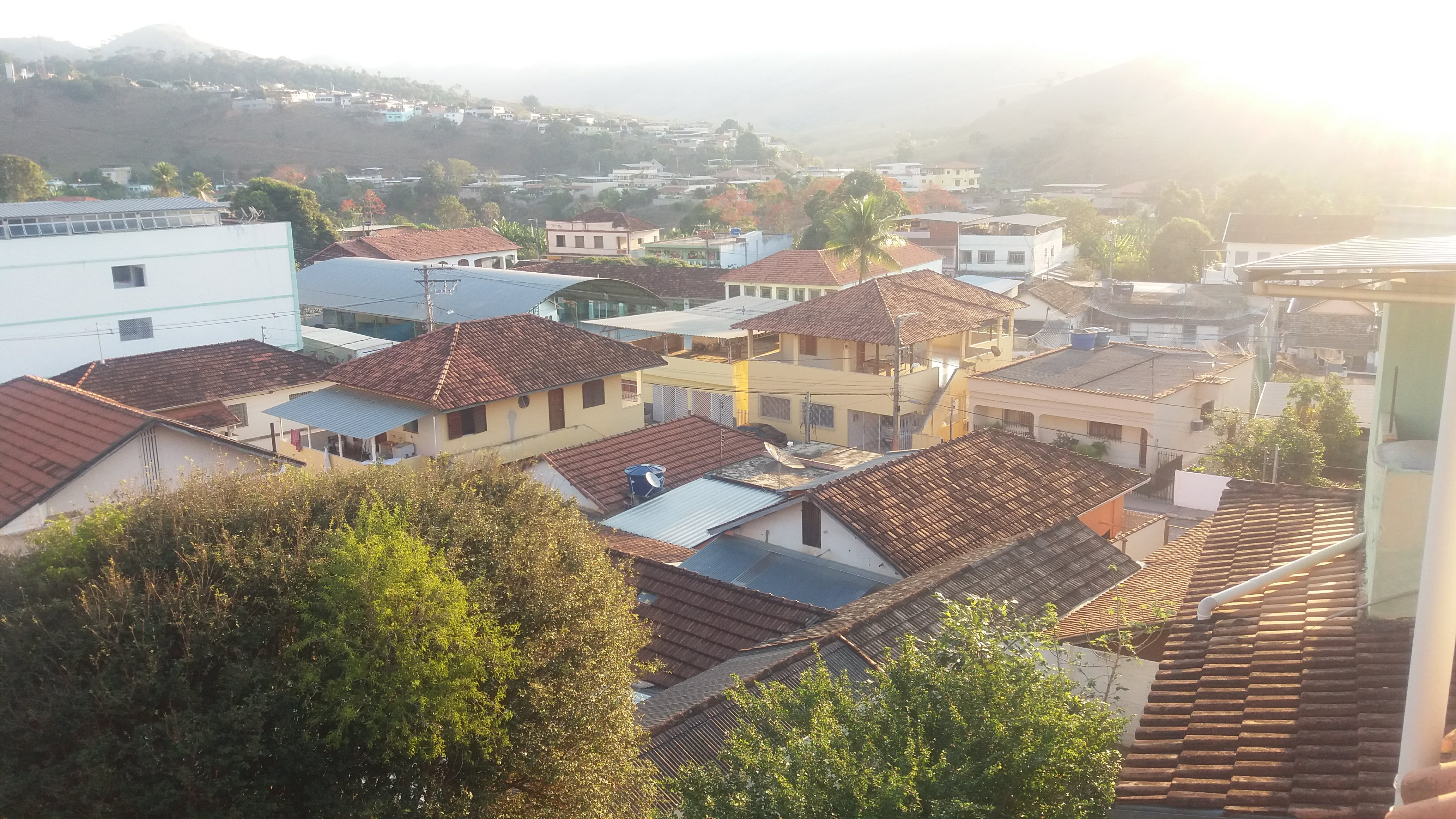 Zona central de Argirita